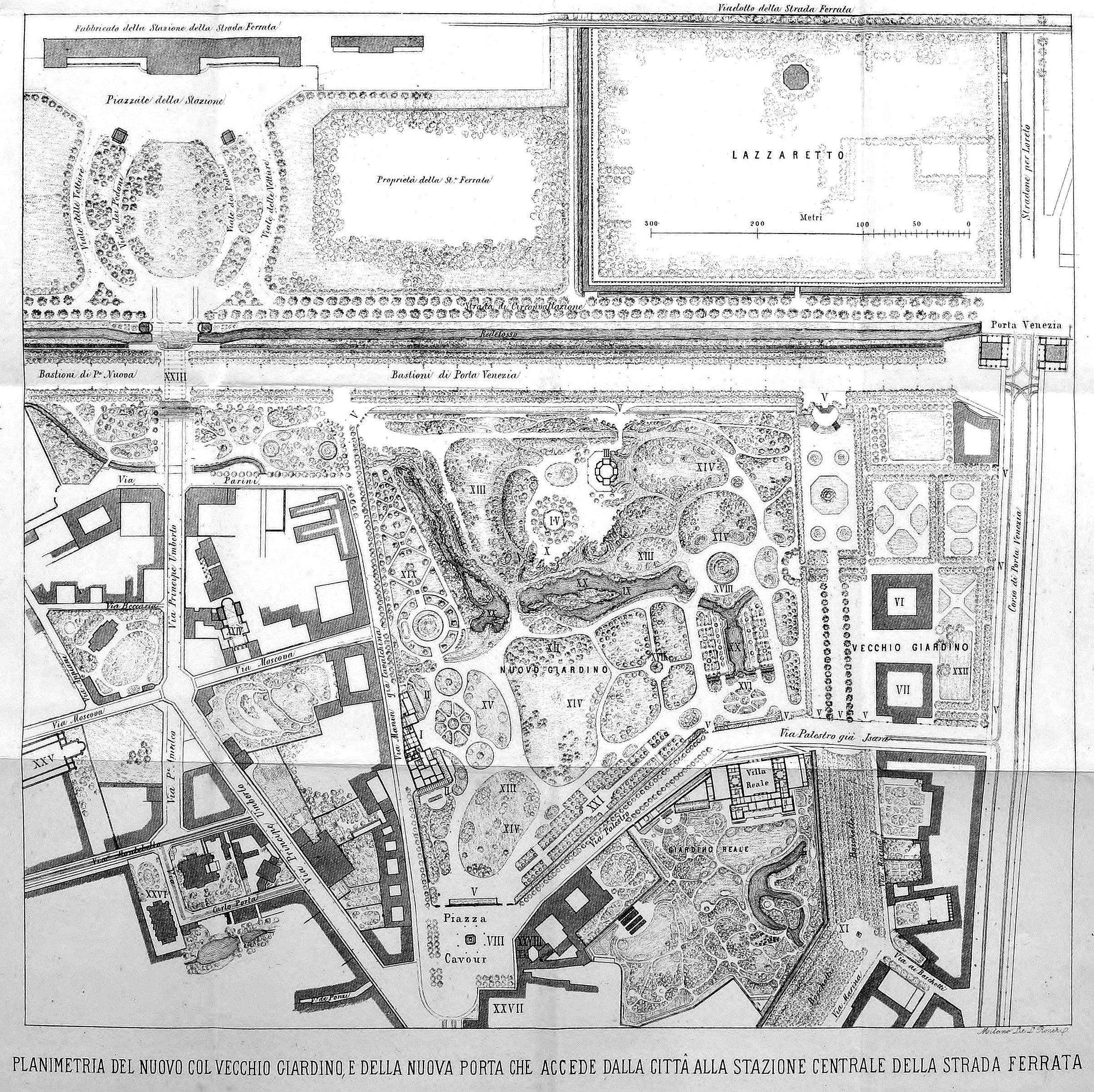 Mappa del 1869 indicante l'originale sistemazione dei Giardini Pubblici